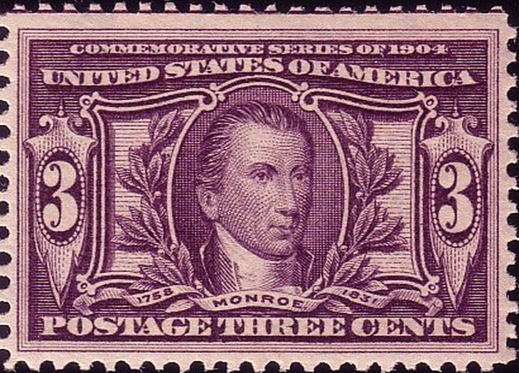 US Postage stamp, James Monroe, 1904 issue, 3c